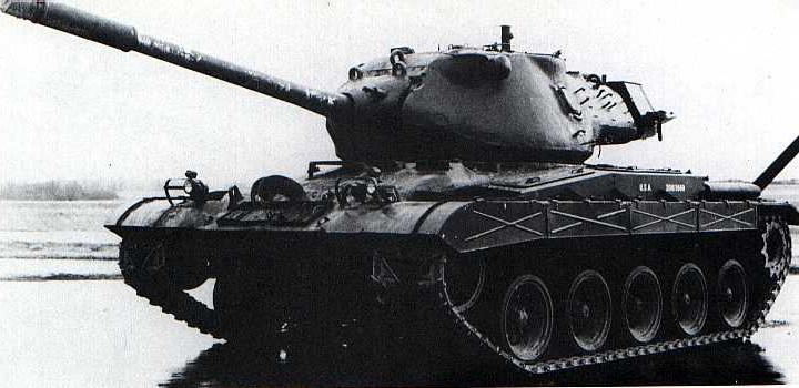 T42 medium tank (pilot number 1) at Aberdeen Proving Ground